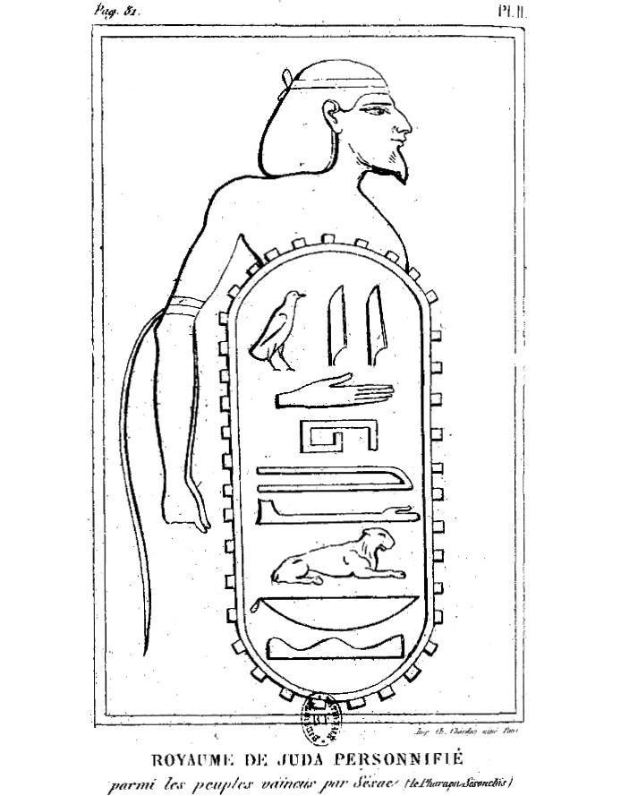 Lettres ecrites d'Egypte et de Nubie en 1828 et 1829 Jean-François Champollion